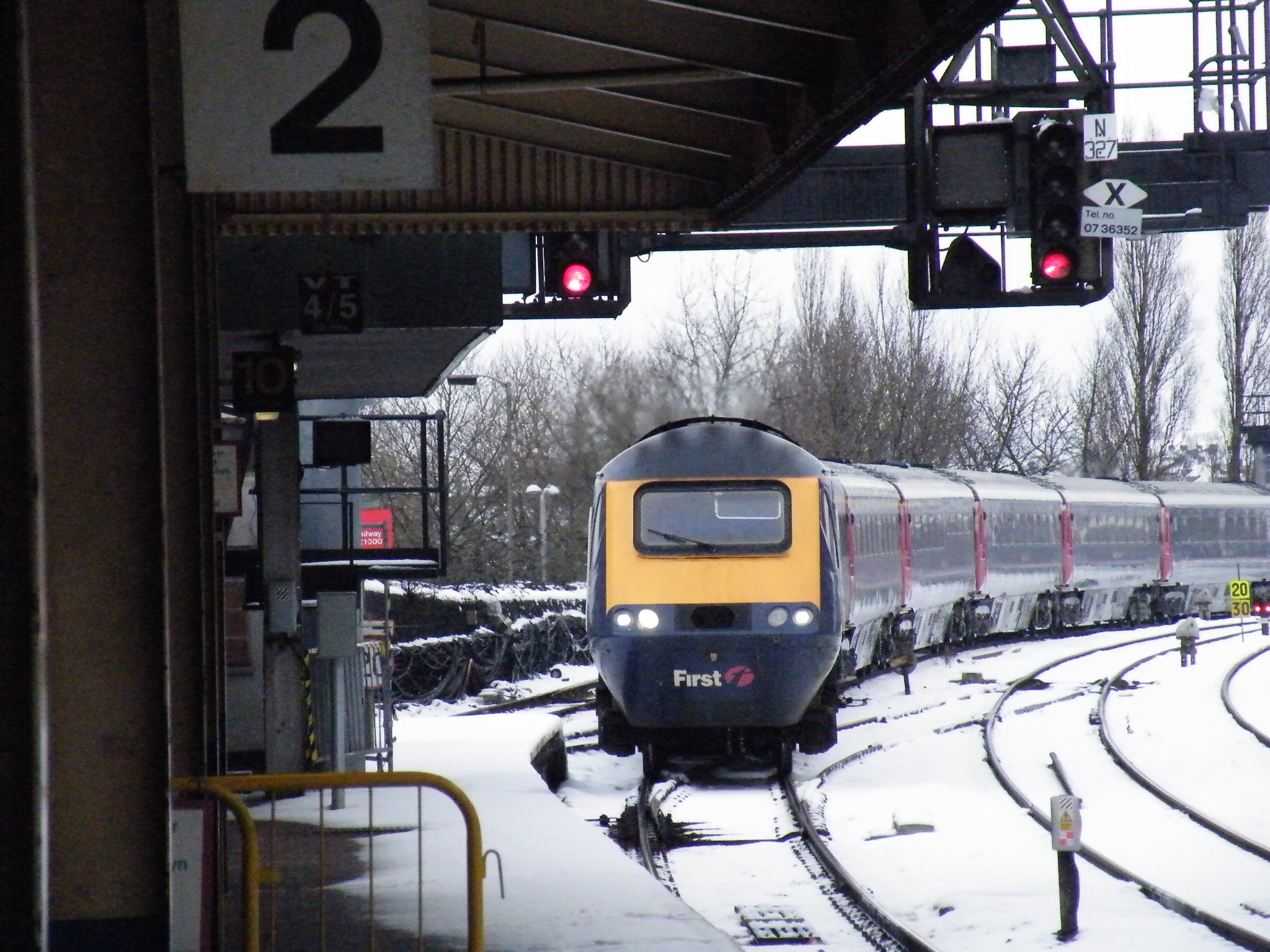 Gorsaf Reilffordd Cas-newydd